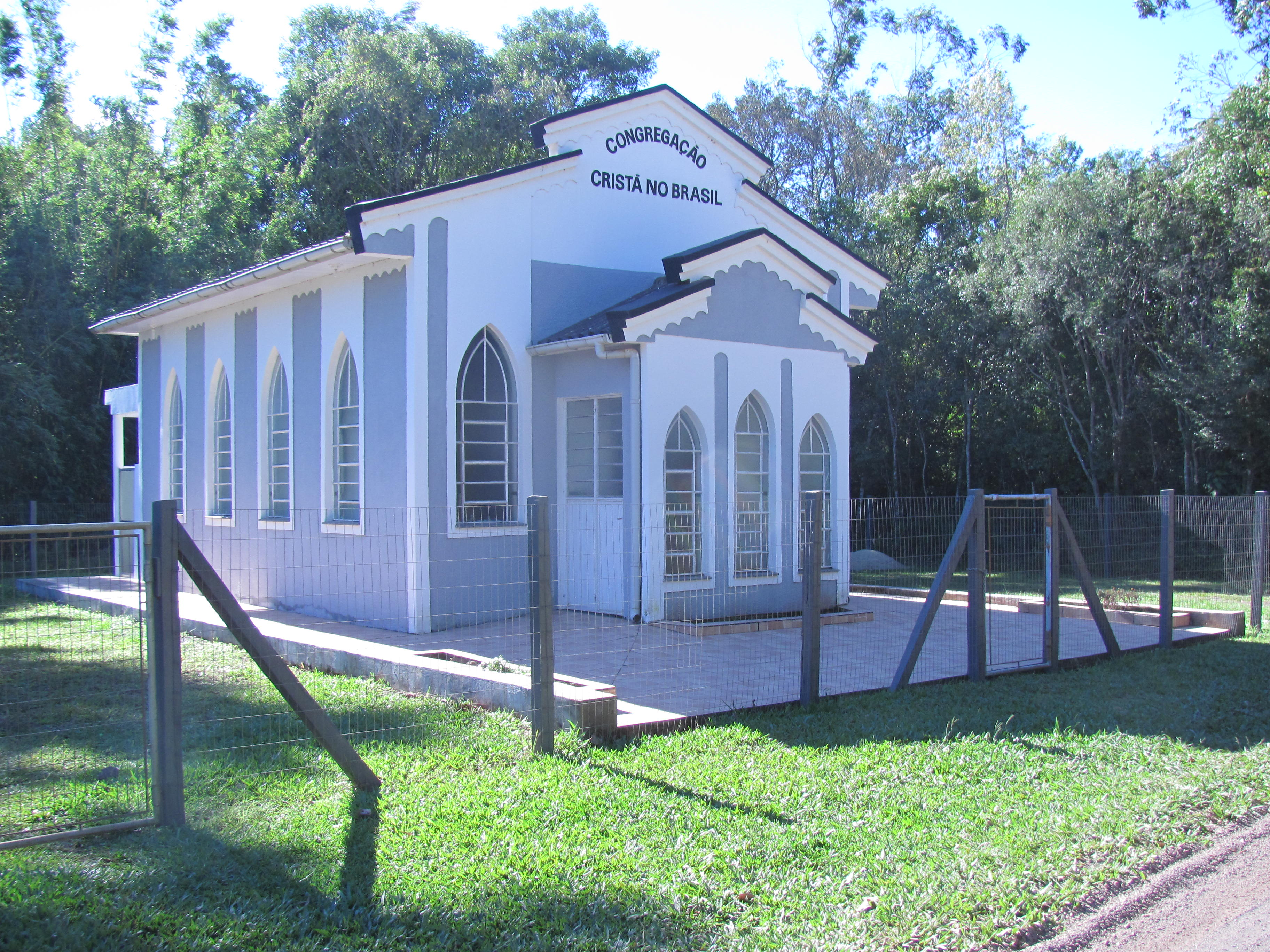 Igreja Congregação Cristã no Brasil